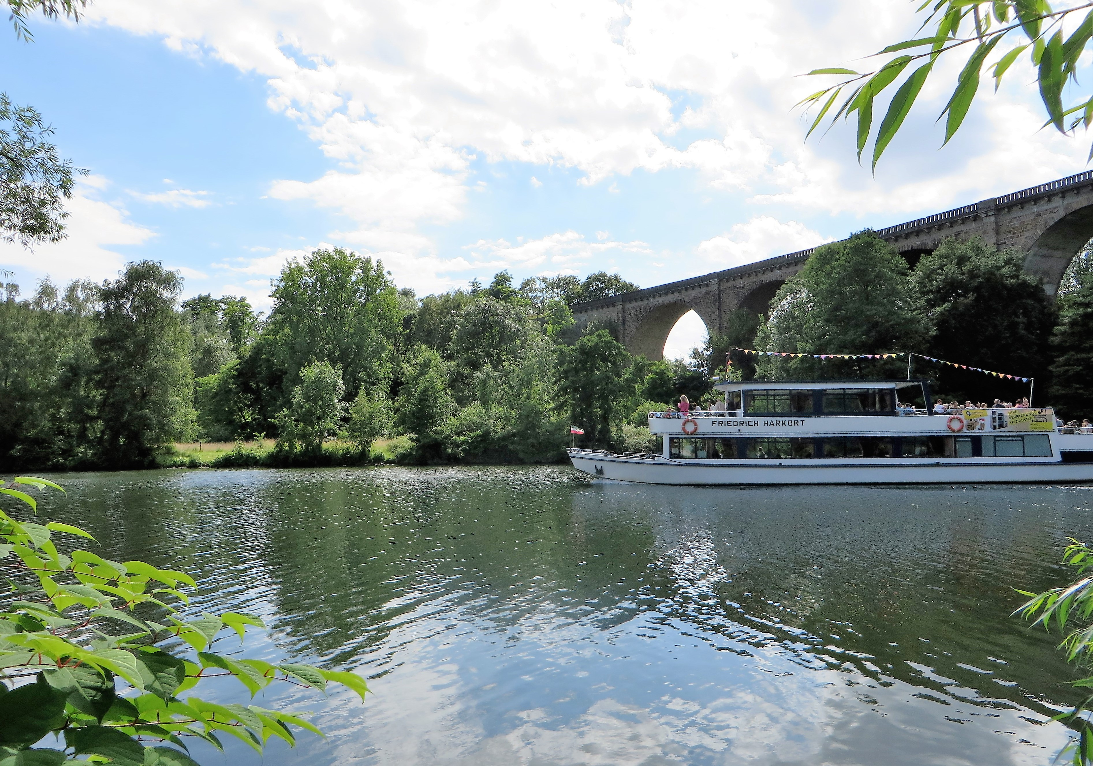 Naturschutzgebiet HA-009 „Kaisbergaue“ in Hagen-Vorhalle. Blick vom Herdecker Ruhrufer auf die Ruhr, den Ruhr-Viadukt und die gegenüberliegende Kaisbergaue. Das Schutzgebiet liegt östlich der Kläranlage Vorhalle zwischen dem inselartig im Ruhrtal aufragenden Kaisberg und der Ruhr. Es handelt sich um die Kaisbergweiher als die letzten Relikte des alten Volmelaufes, um die Auenbereiche, um die Ruhruferzonen und den bewaldeten Nordosthang des Kaisberges (185 m). Der Hagener Ruhrbereich an dieser Stelle gehört zum Landschaftsschutzgebiet „Harkortsee“. Die MS „Friedrich Harkort“ (Foto) auf der Fahrt von der Anlegestelle Wetter zur Anlegestelle Herdecke.